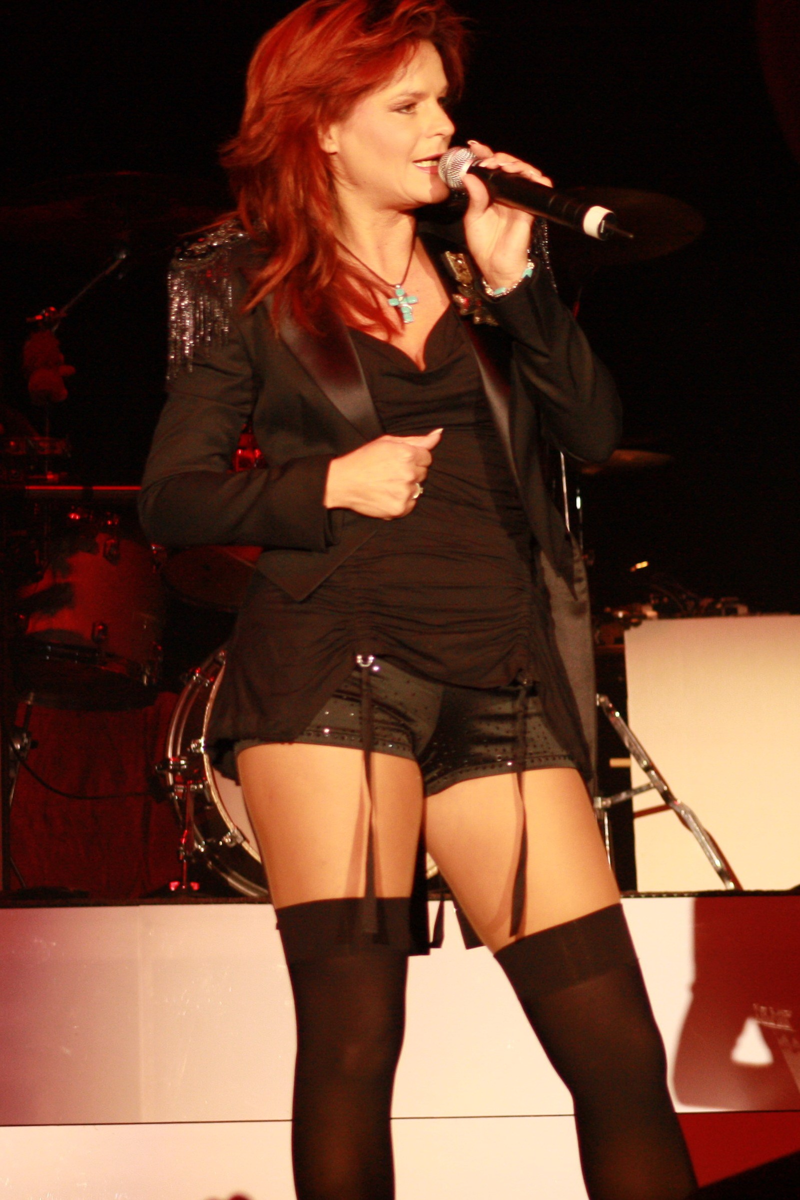 Andrea Berg am 24.10.2010 in Magdeburg (Bördelandhalle)